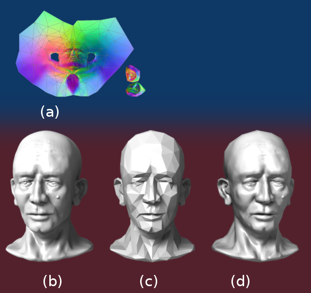 (a) นอร์มอลแมพ, bake ด้วยจาก (b) ไป (c) ด้วยเบลนเดอร์ (b) โมเดลสามเหลี่ยม (tri) 78,642 ชิ้น, sculpt ด้วยเบลนเดอร์ (c) 768 ชิ้น decimate จาก (b) (d) 768 ชิ้น เรนเดอร์โดยใช้นอร์มอลแมพ (a)